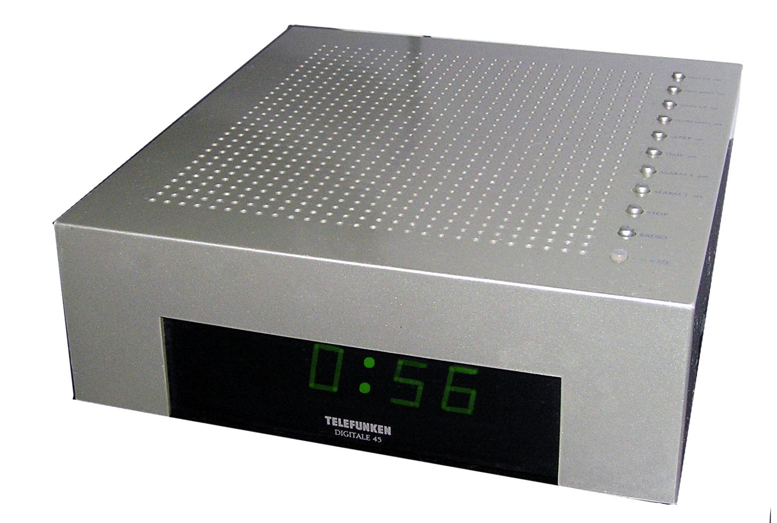 Telefunken alarm clock